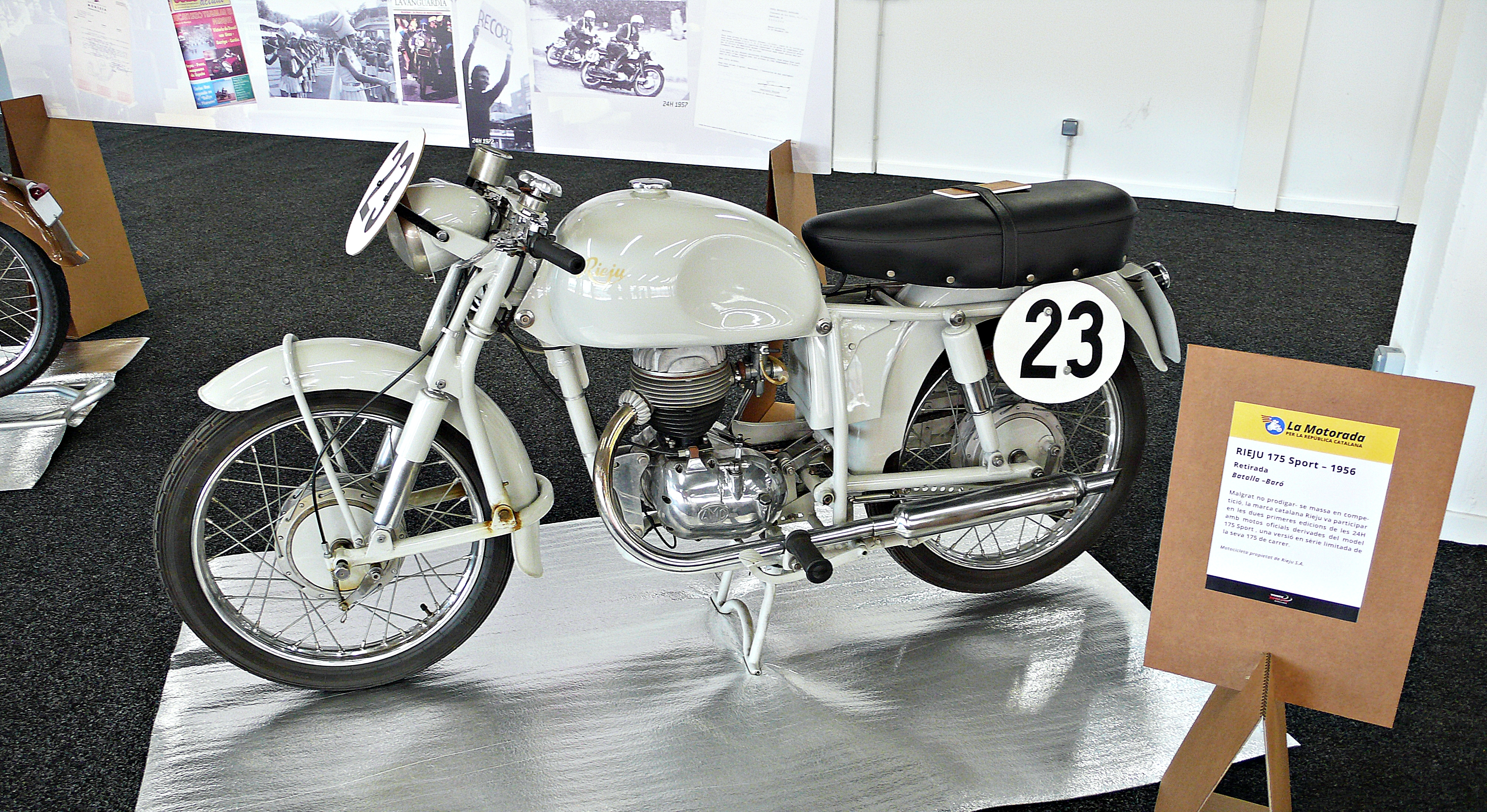 Exposicion motos clasicas 24 Horas de Catalunya